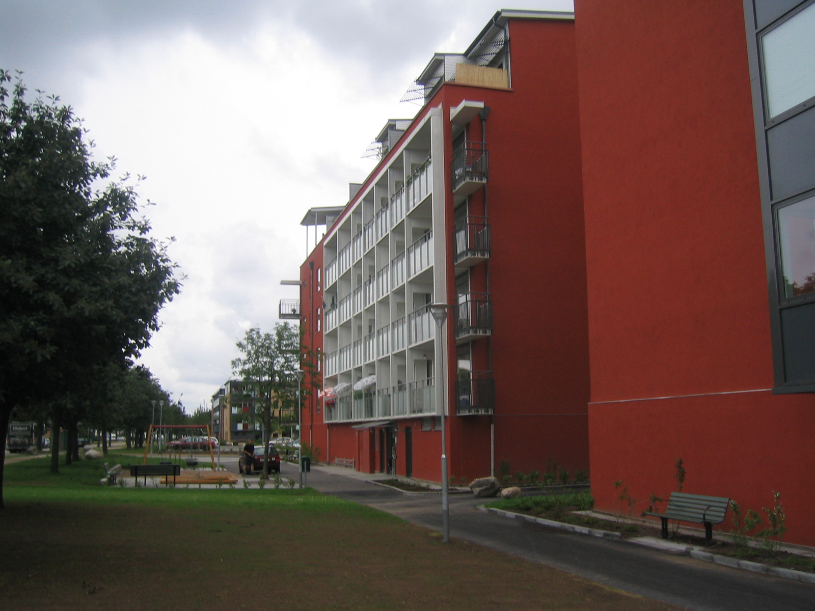 Andersberg, nya terasshusen